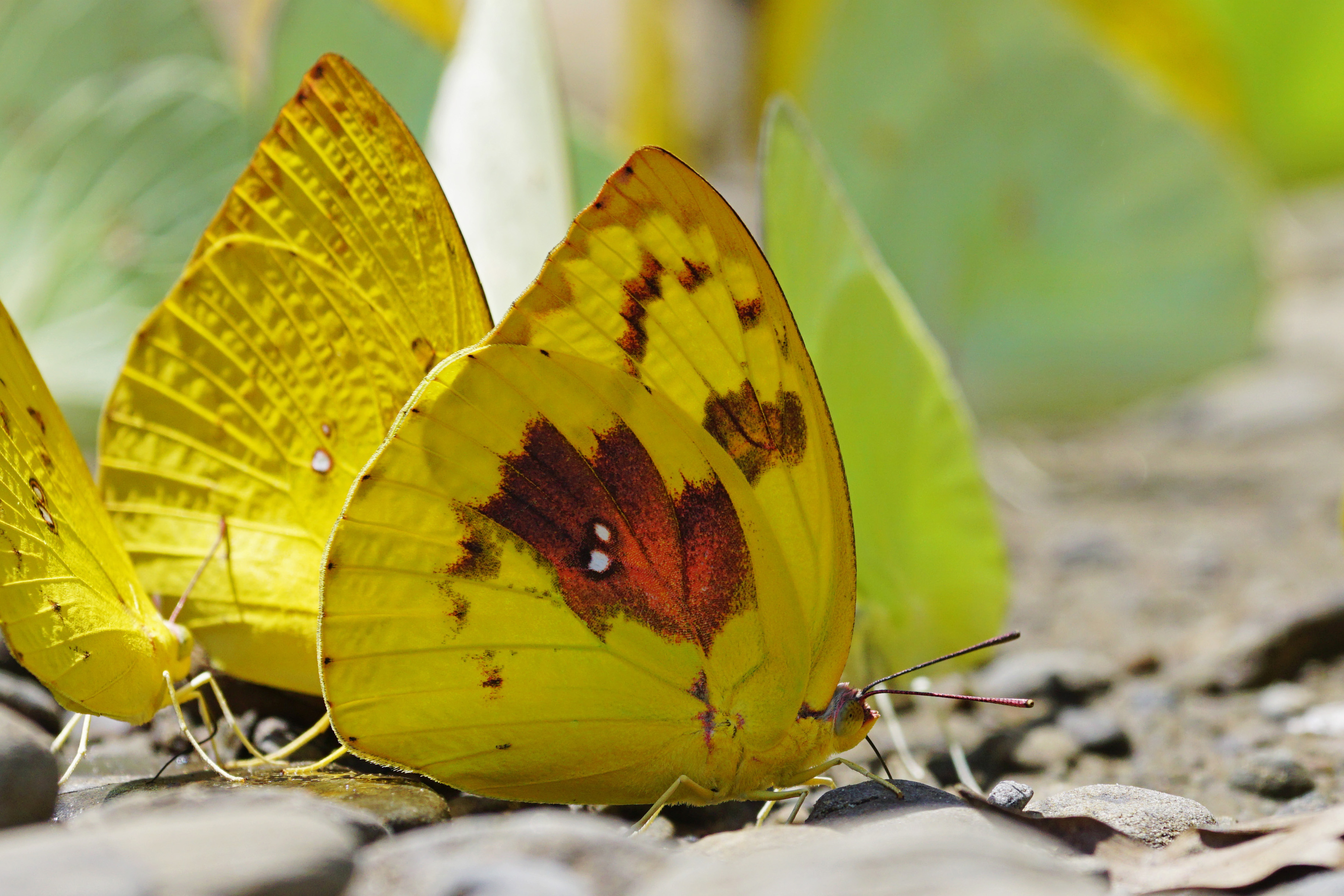 遷粉蝶 Catopsilia pomona 紅斑型